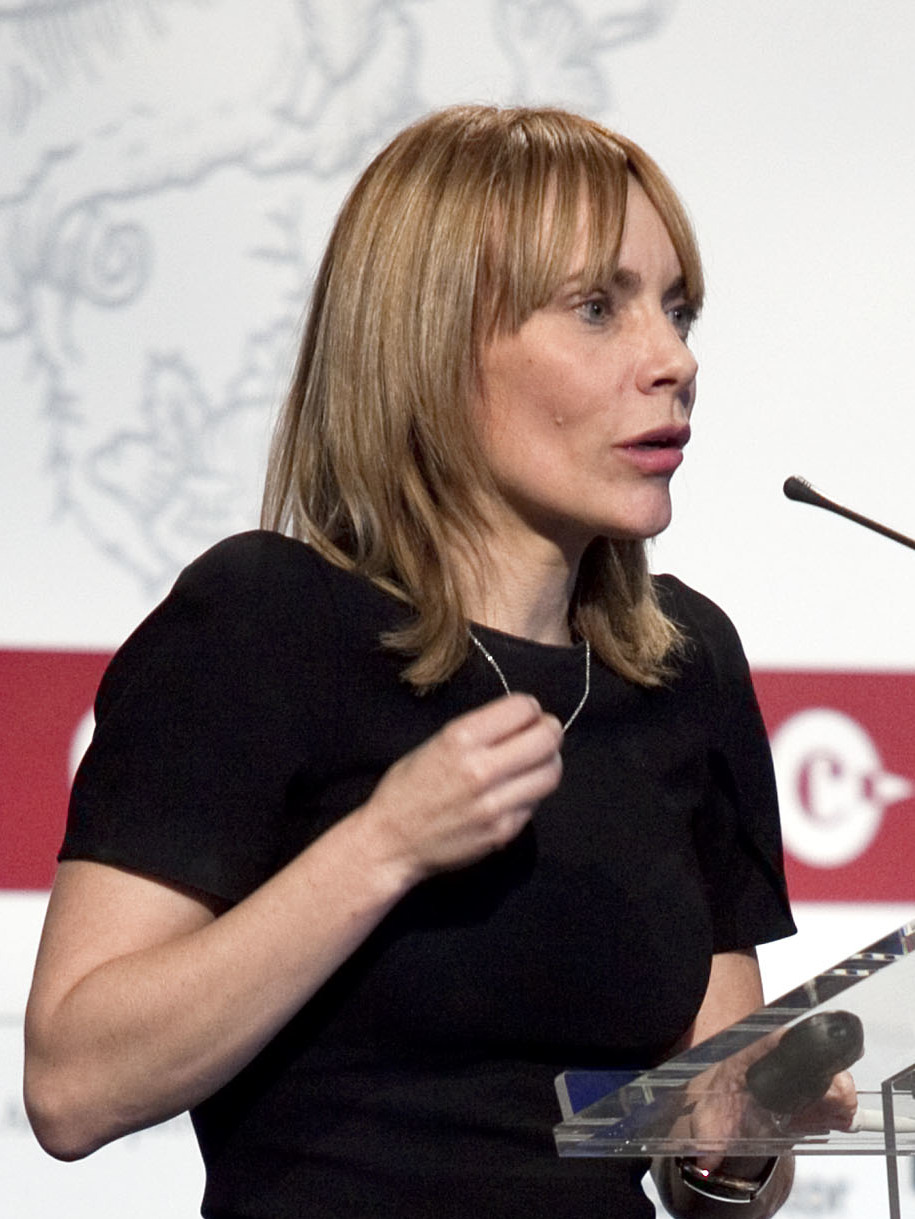 La presidenta de Microsoft Ibérica, María Garaña, va parlar sobre la innovació i les noves tecnologies com a motor de recuperació econòmica i generador d’ocupació.